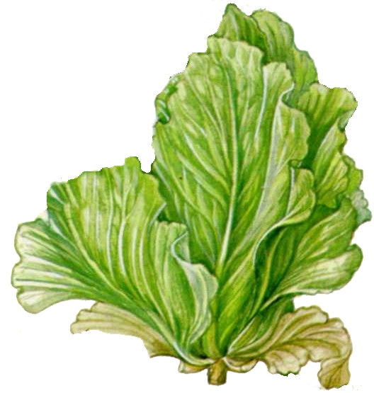 Almeirão